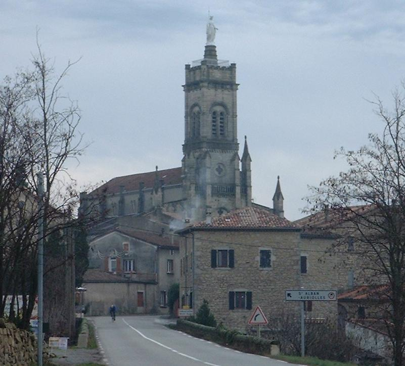 basilique Notre-Dame de Bon Secours à Lablachère (Ardèche)